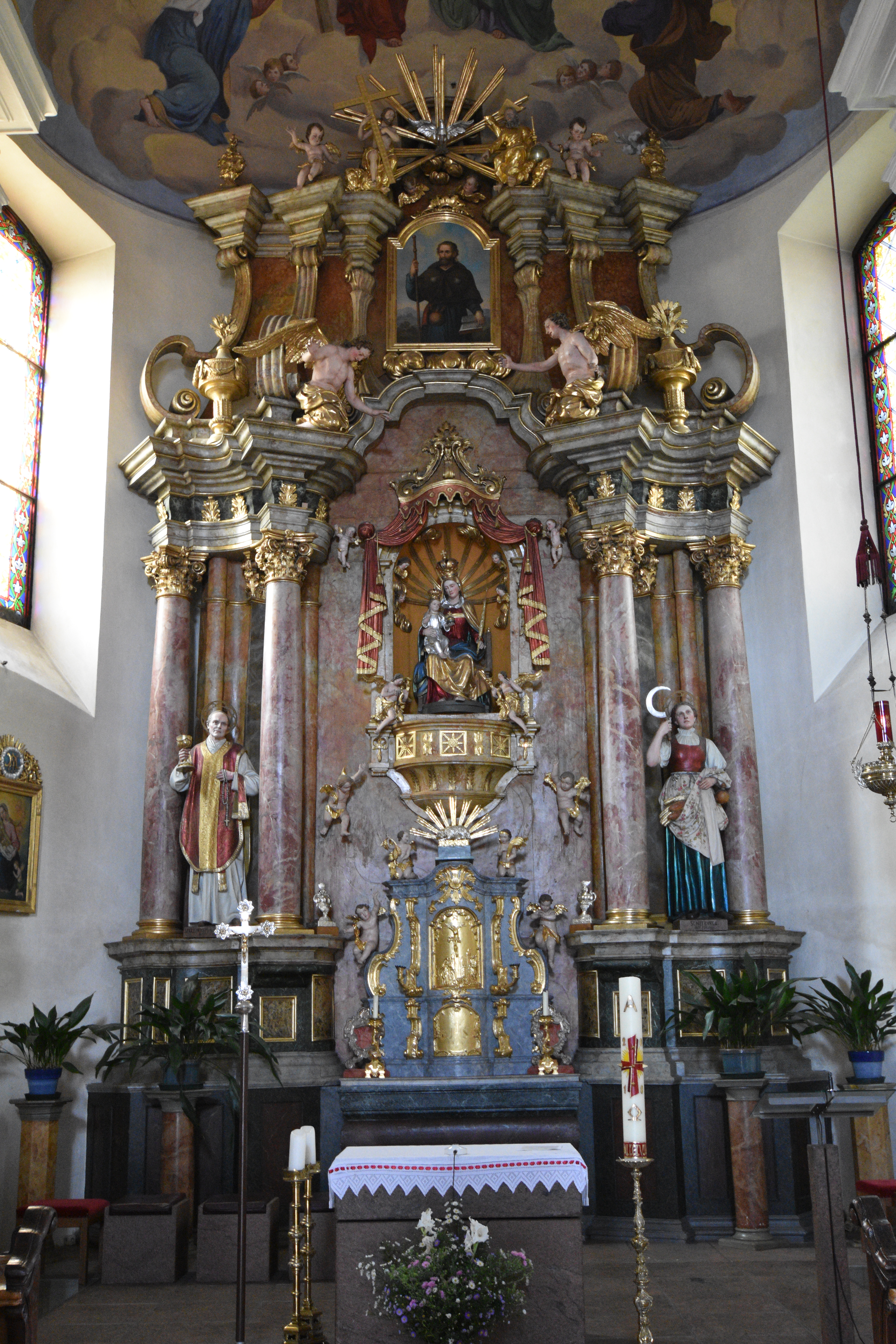 Hochaltar Pfarrkirche Nestelbach Interior